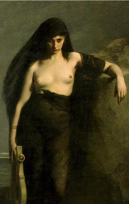 detail